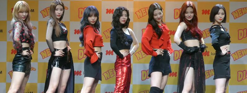 20일 오후 서울시 도봉구 창동 플랫폼 창동 61에서 다이아(유니스, 기희현, 제니, 정채연, 예빈, 은채, 주은, 솜이)의 다섯 번째 미니 앨범 'NEWTRO' 발매기념 쇼케이스가 열려 다이아가 단체 포토타임을 갖고 있다.